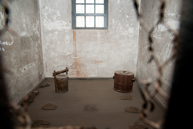 Ehemaliges Russisch-Japanisches Lüshun Gefängnis: Gefängniszelle für bis zu 10 Häftlinge